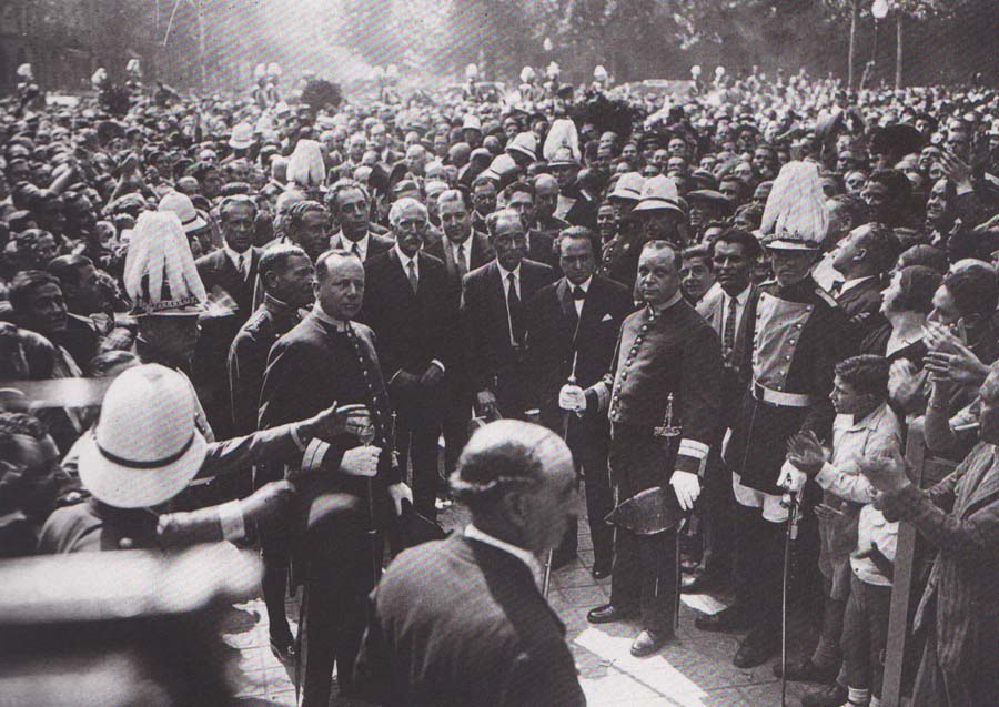 Generlidad Cataluña y Ayuntamiento Barcelona en el homenaje a Rafael Casanova 1931